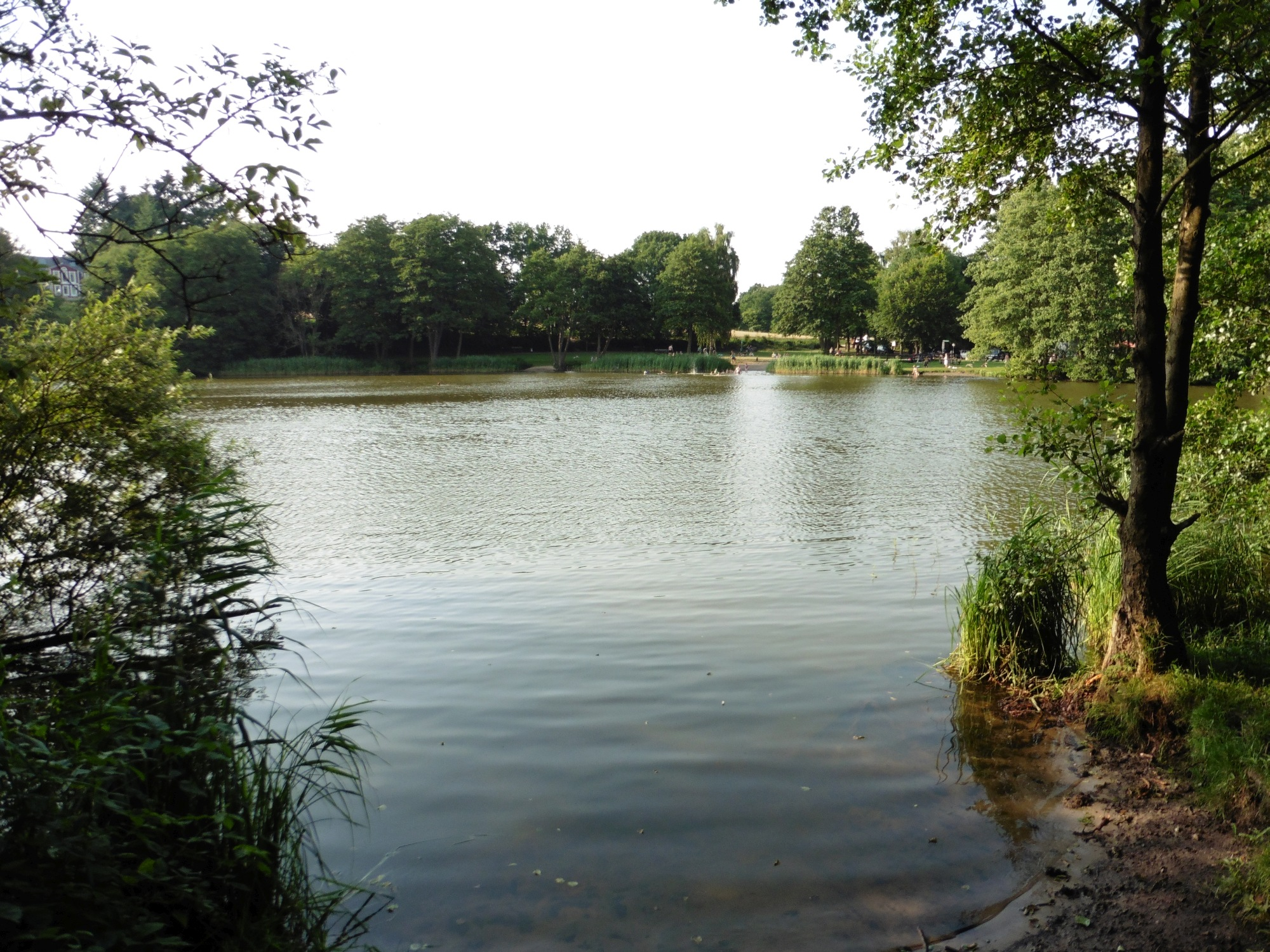 Lütjensee, Badestrand